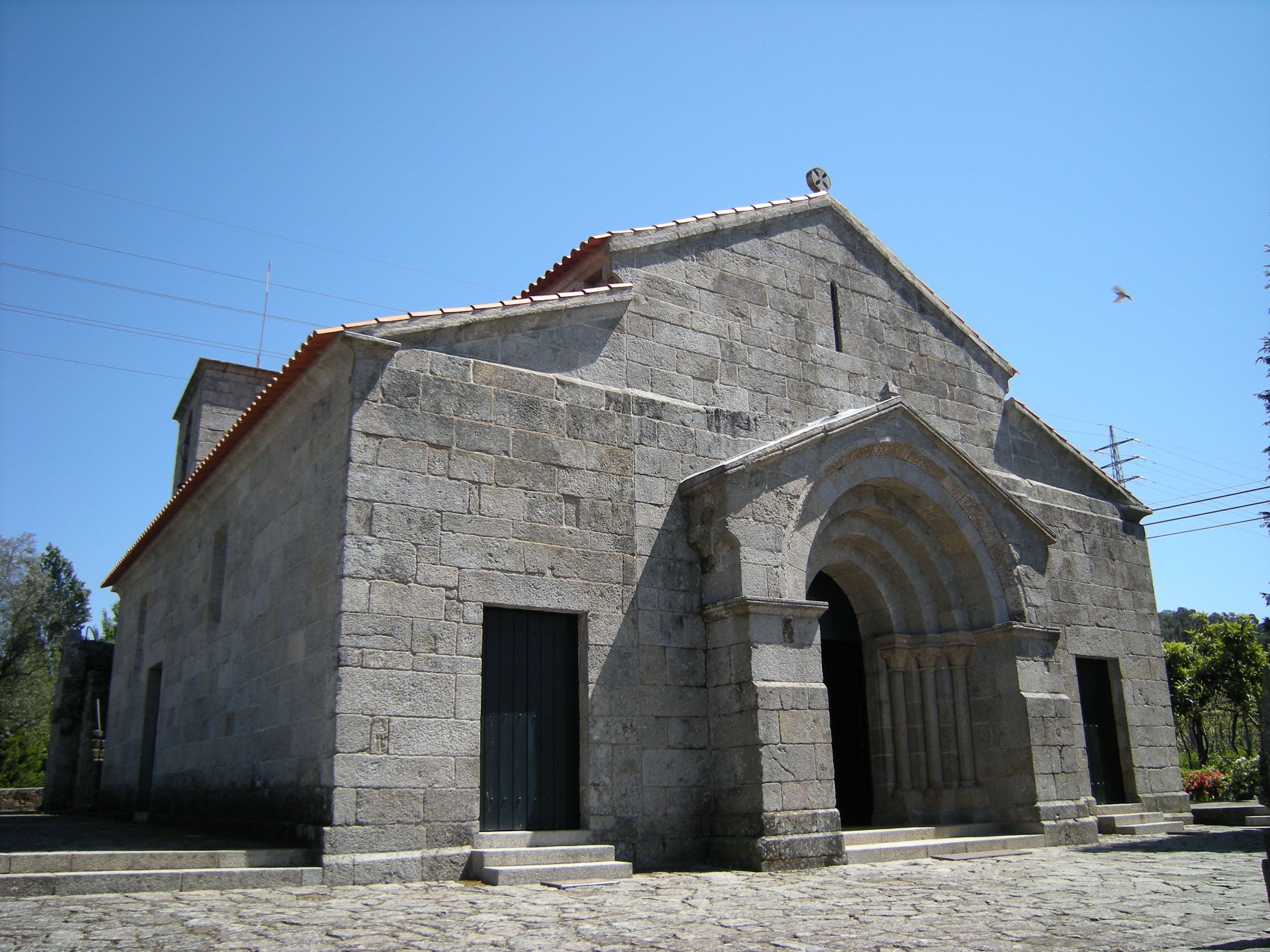 Igreja de Santa Maria de Airães. Lugar do Mosteiro, freguesia de Santa Maria de Airães, concelho de Felgueiras, Porto, Portugal.